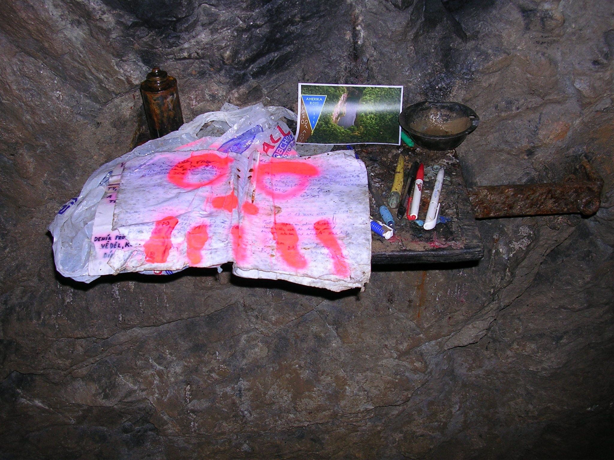 Česky: Lomy Amerika, Hagenova štola. Polička s deníkem u Hagenovy studánky a gongu.